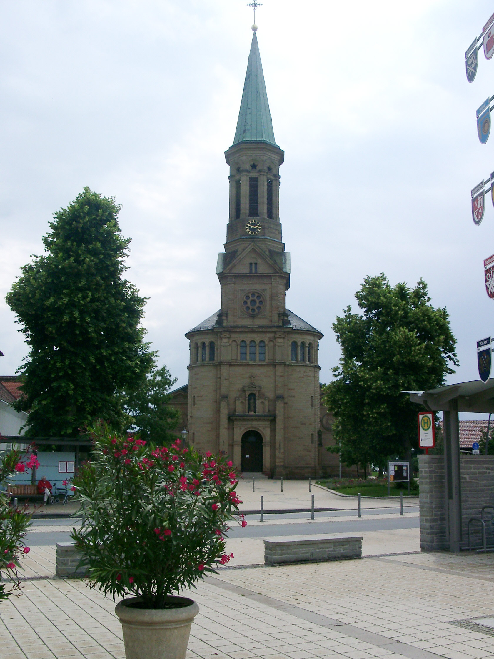 Forst (Baden), Katholische Pfarrkirche St. Barbara